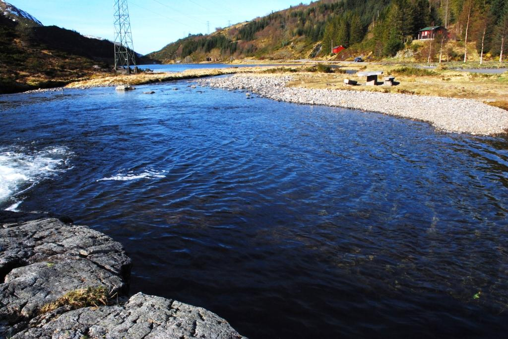 Osavatnet i Arna Date=12.10.2009 Photo: Svein Harkestad, Bergen in Norway